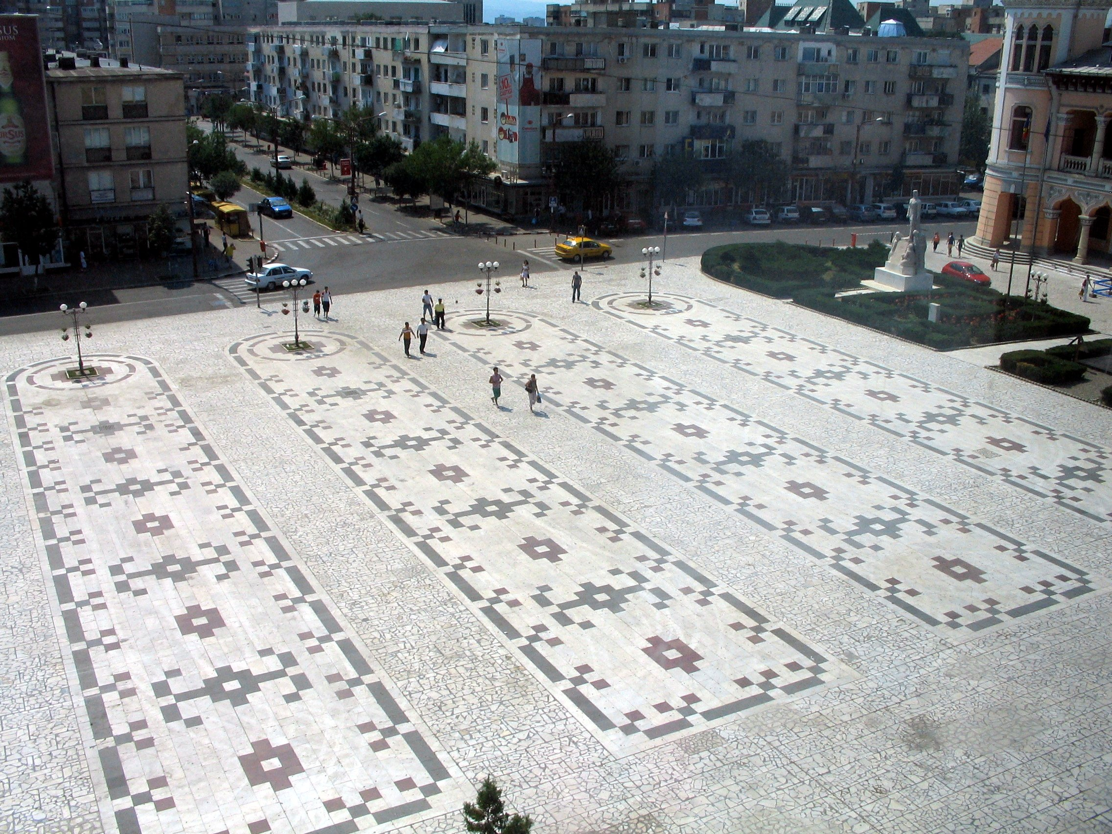 Dacia Square, Buzău, Romania